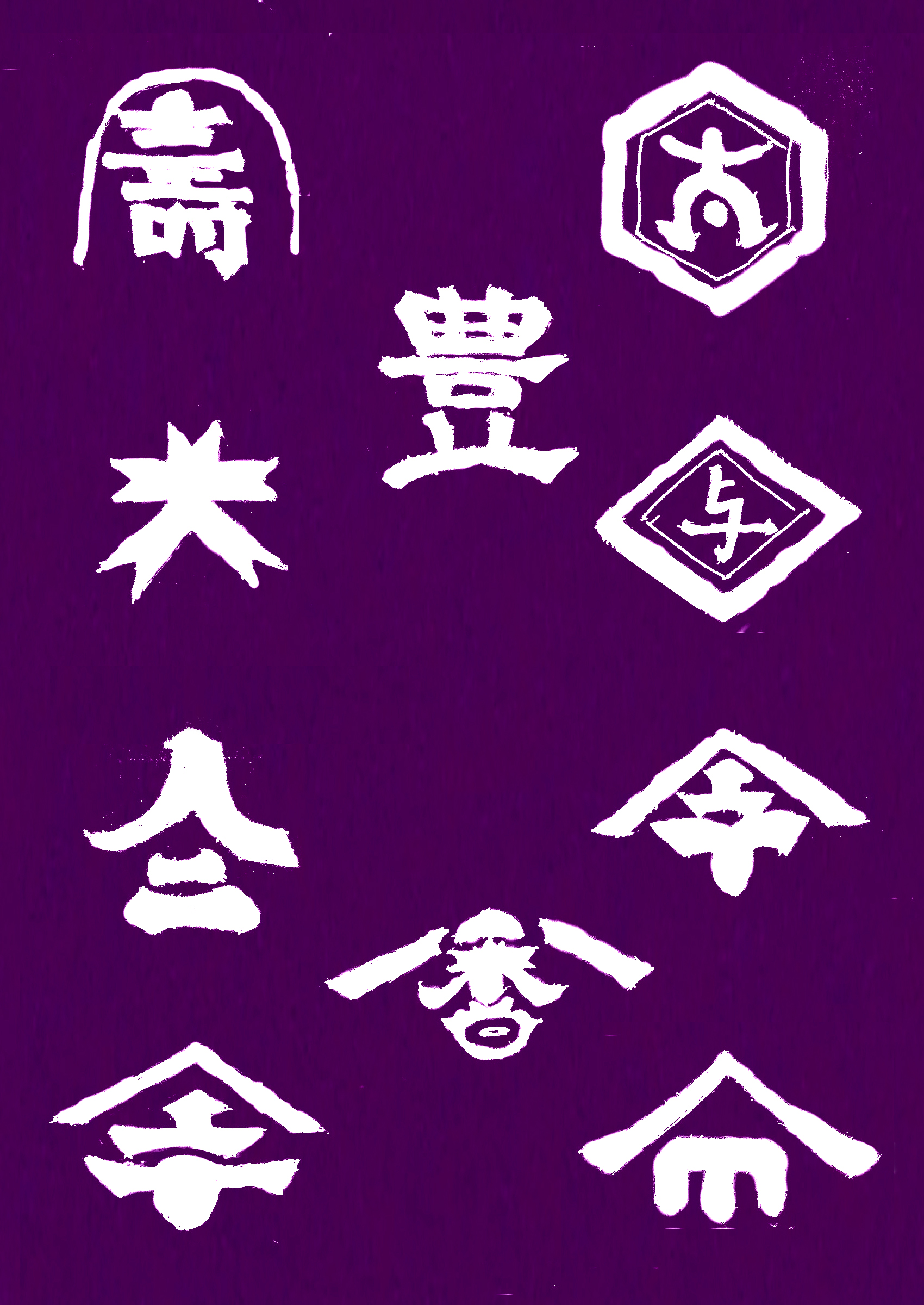 野田醤油仲間の暖簾